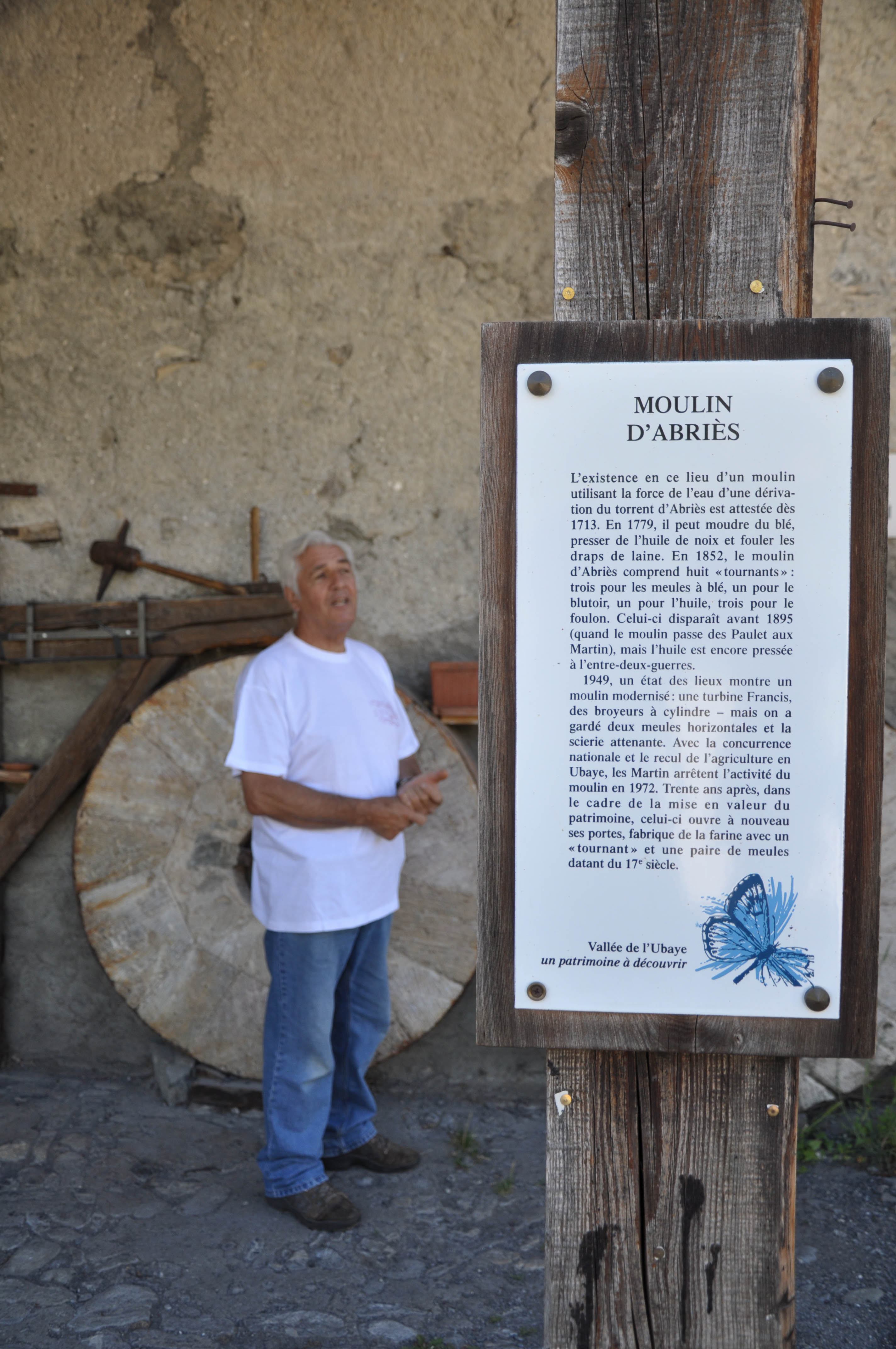 Histoire du Moulin d'Abriès à Jausiers